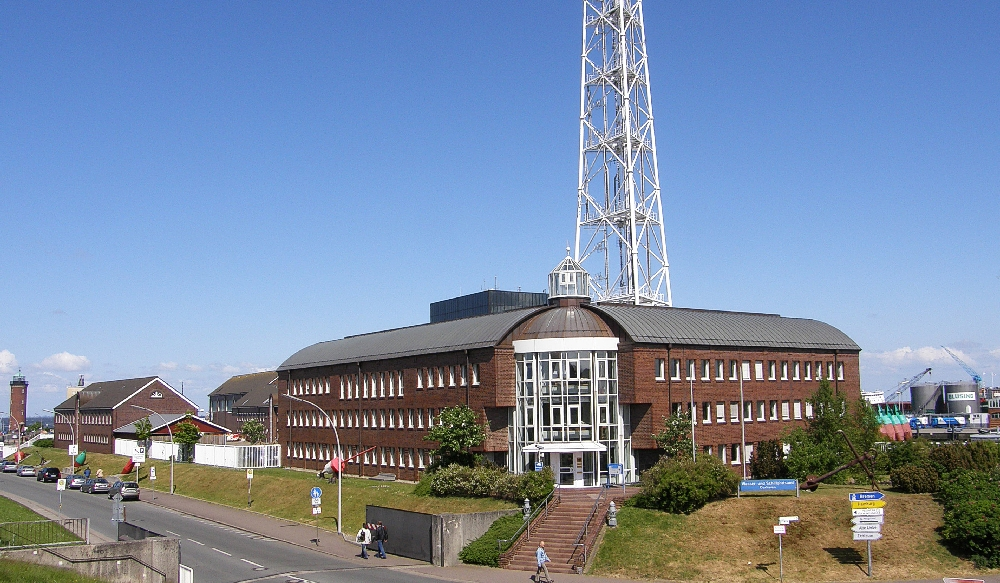 Wasser- und Schifffahrtsamt Cuxhaven